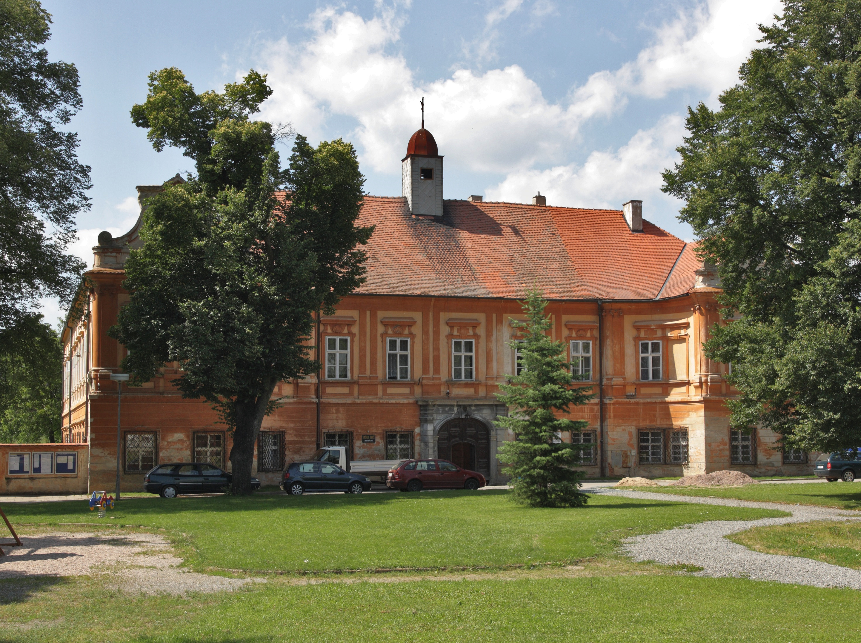 Prštice - zámek.